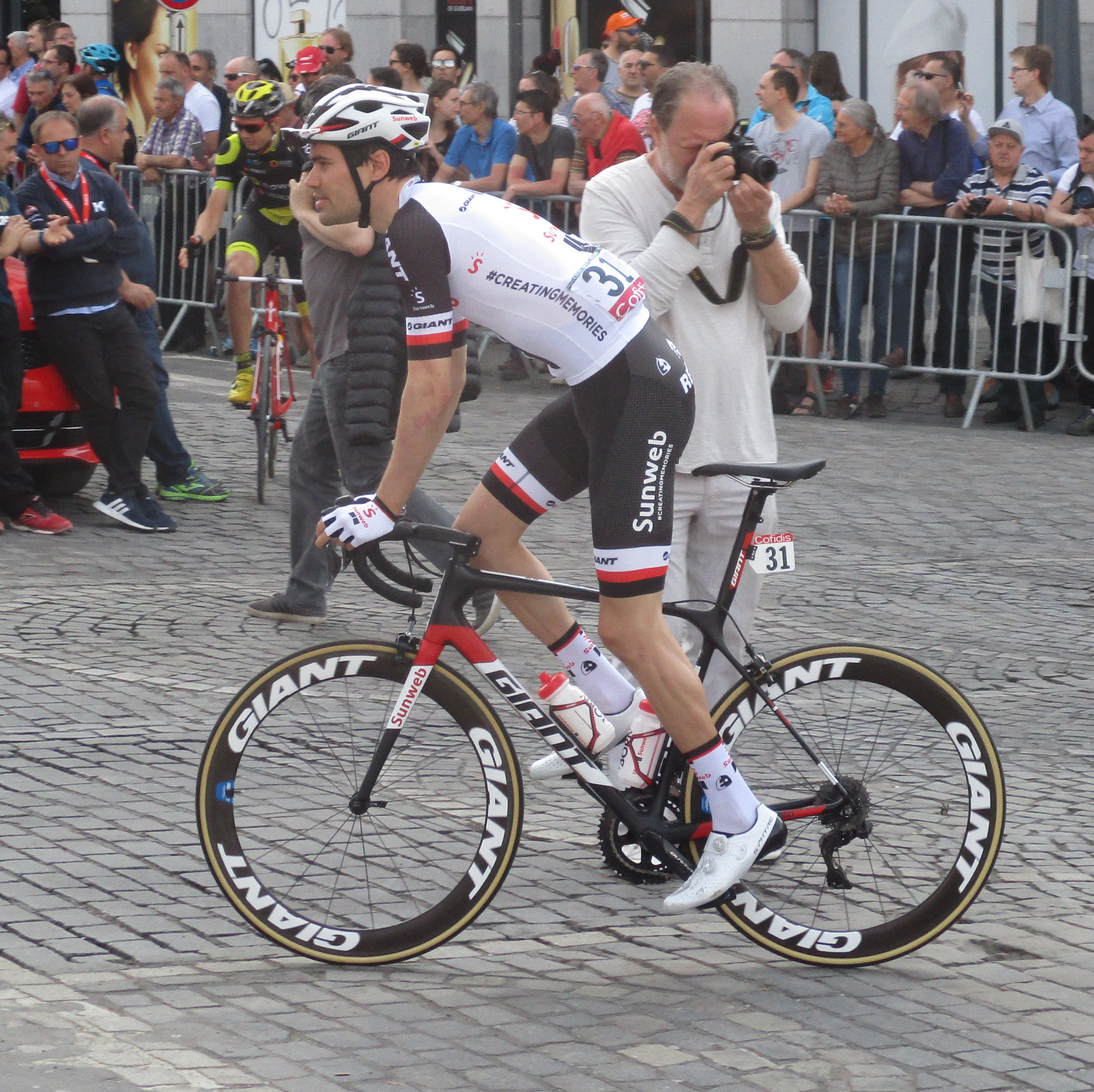 Start van Luik-Bastenaken-Luik 2018 in Luik.